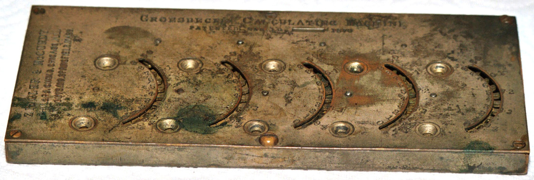 Groesbeck's adding machine (